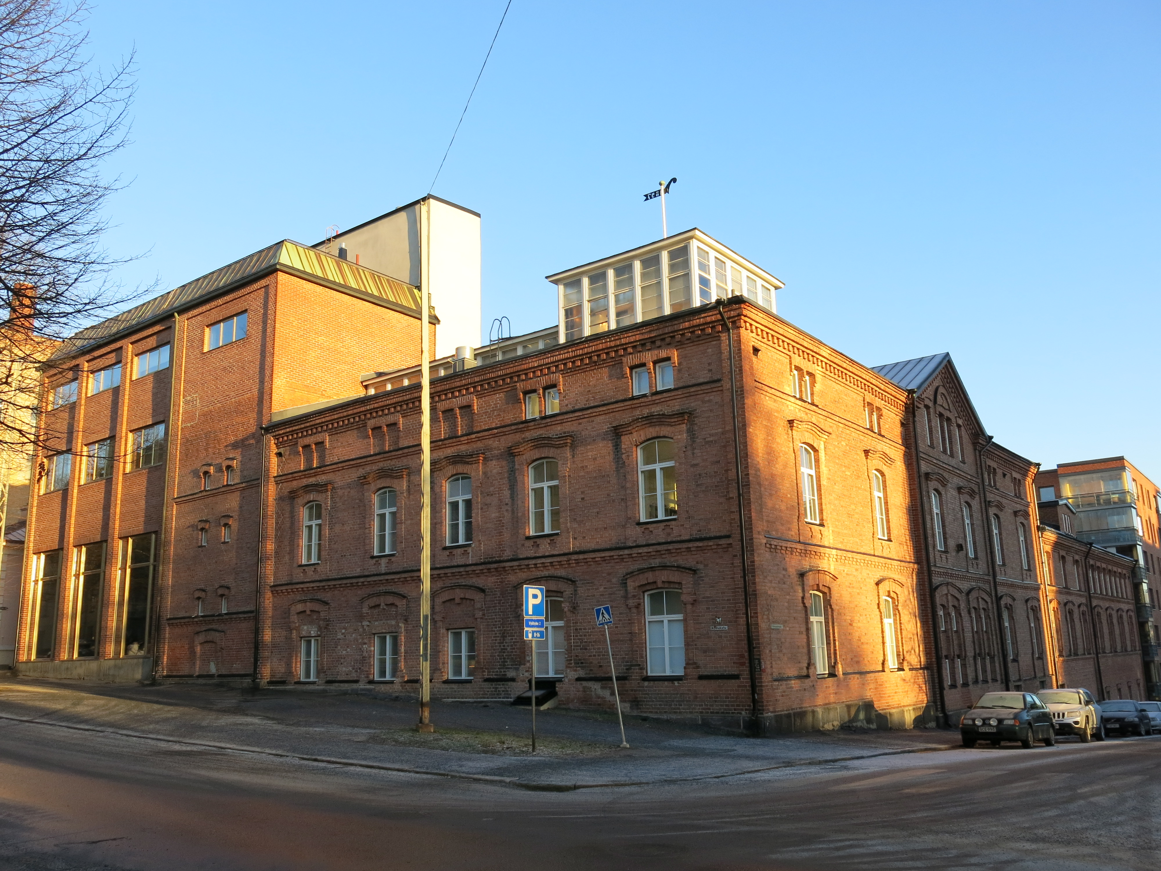 Pyynikin panimo_Henrik Mattjus